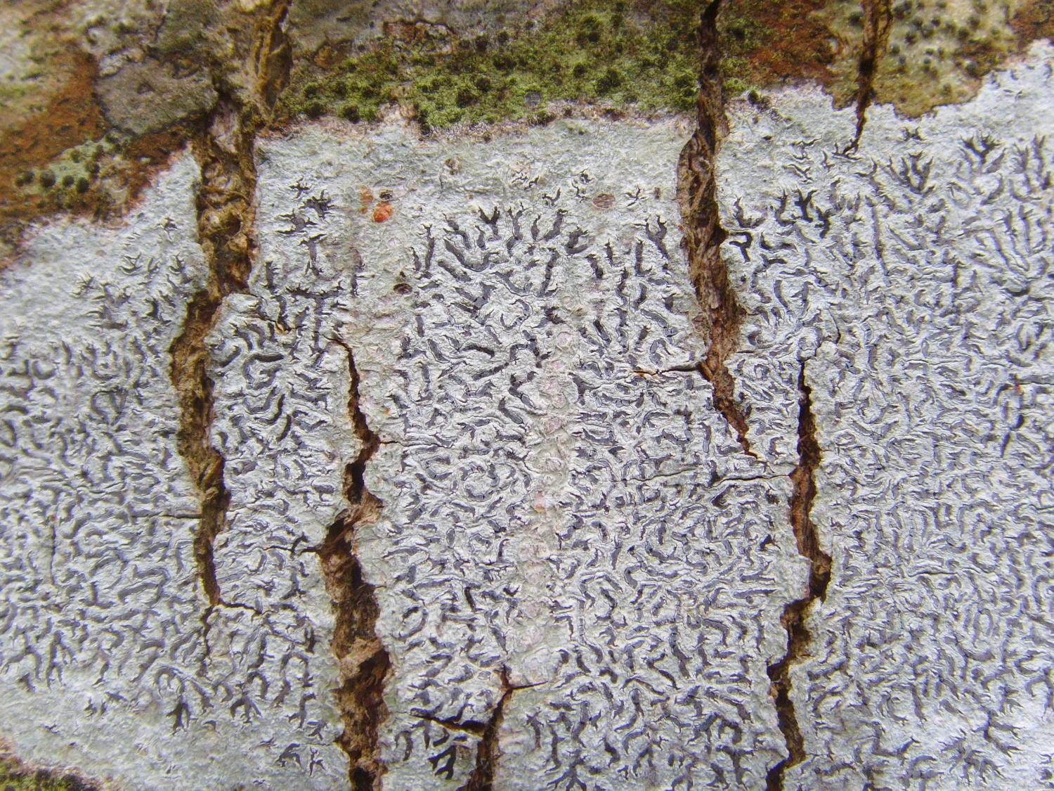 Phaeographis dendritica, Trouguennour (Cléden-Cap-Sizun, Finistère, Bretagne, France)